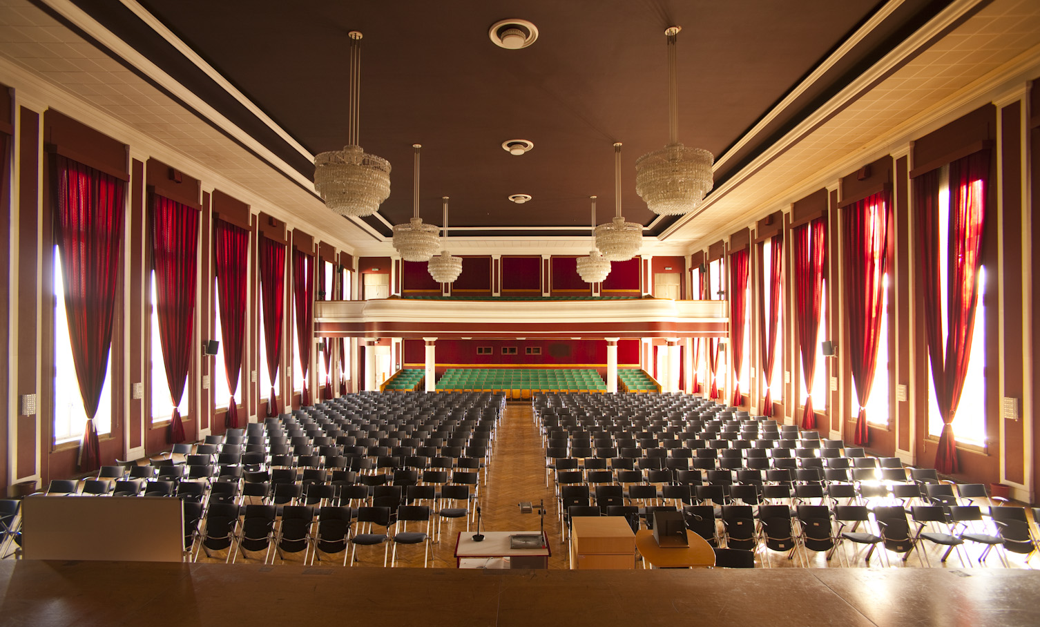 Das Auditorium Maximum der Universität Erfurt. Dort finden Vorlesungen sowie die Immatrikulations- und Graduierungsfeiern statt.